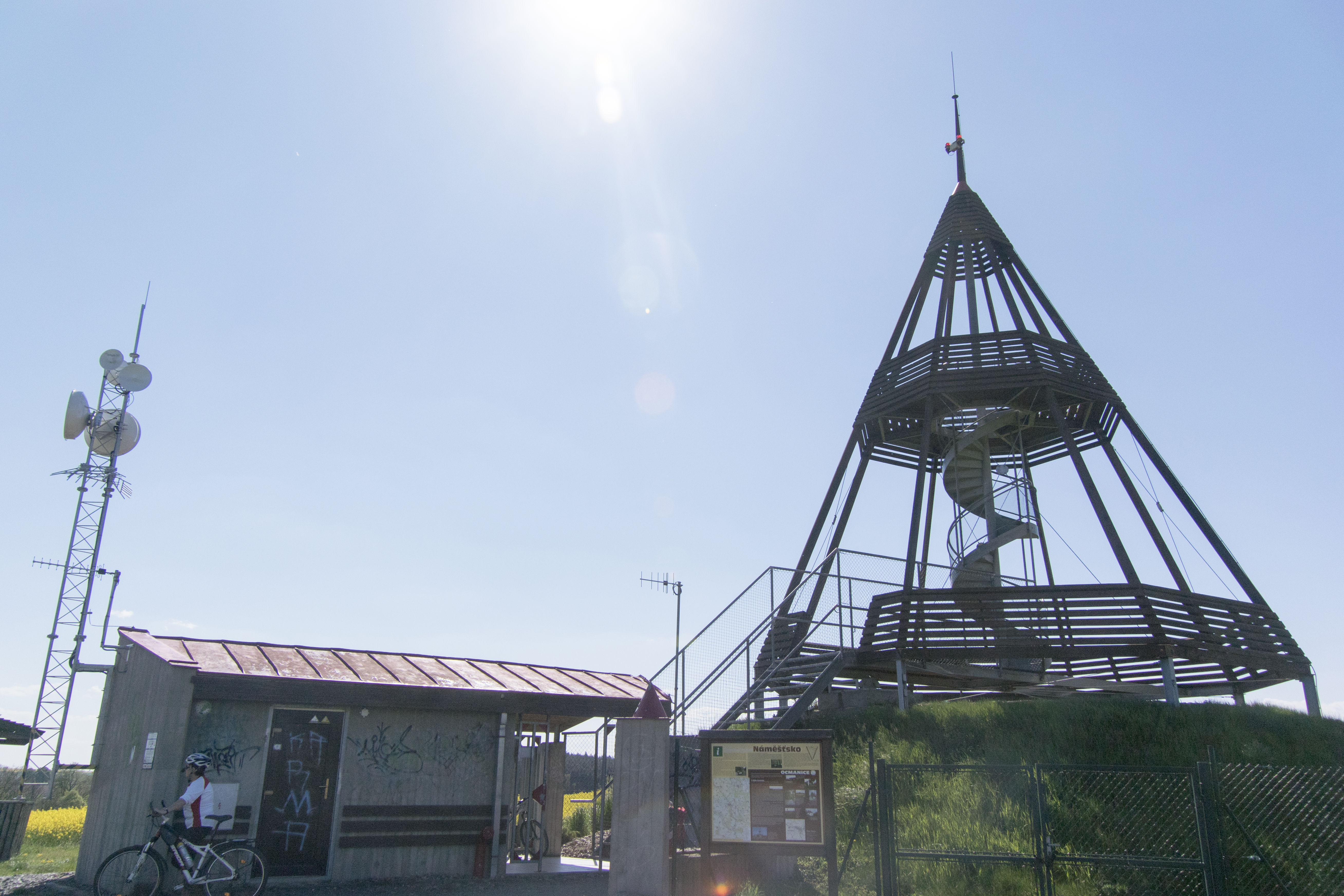 Foto ze dne 7.5.2016